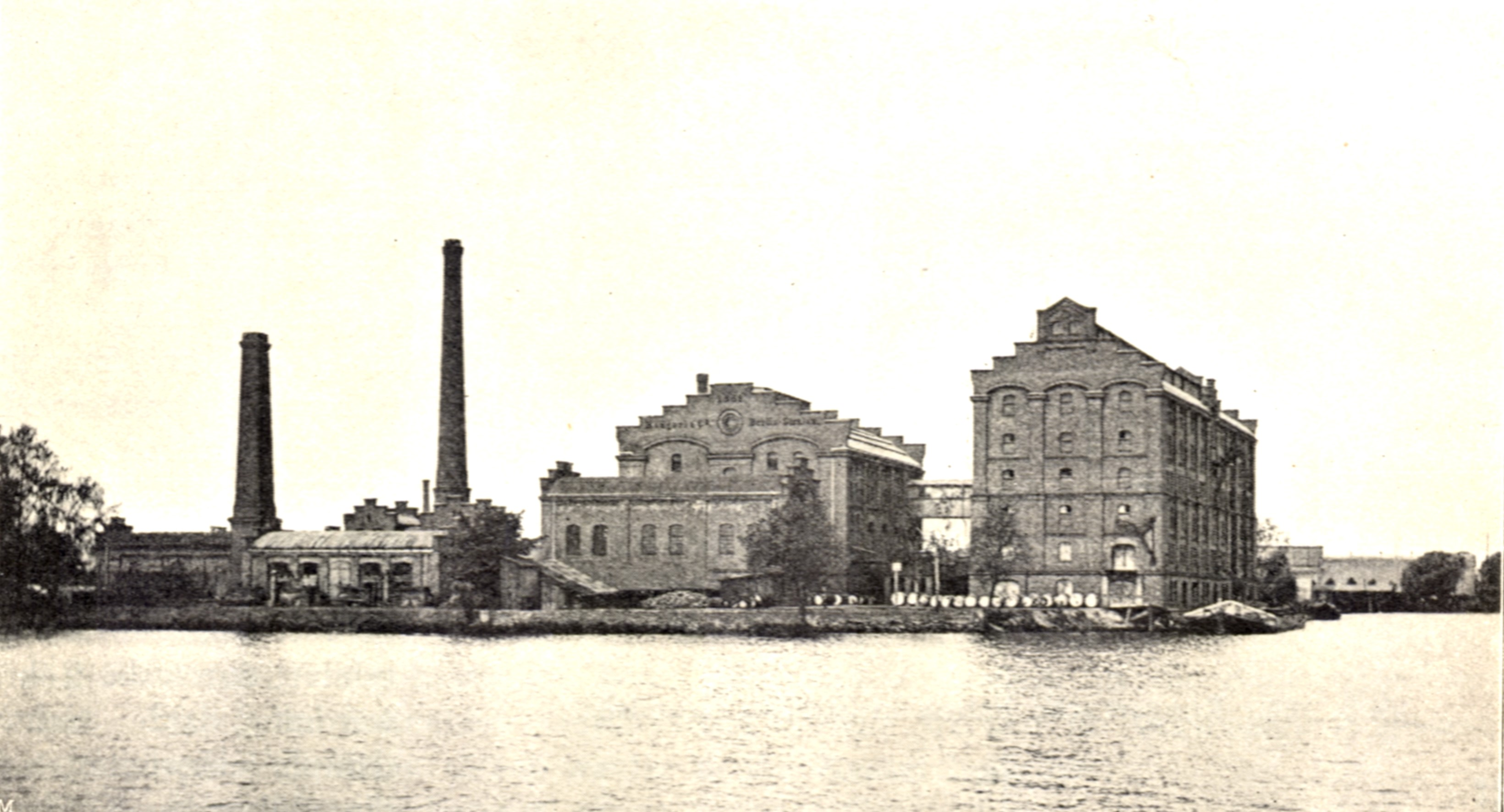 Fabrikanlage der Palmkernöl- und Schwefelkohlenstoffabrik Rengert & Co. in Berlin-Stralau; Blick aus östlicher Richtung über den Rummelsburger See um 1890; Palmkernölspeicher (rechtes Gebäude) erhalten und unter Denkmalschutz